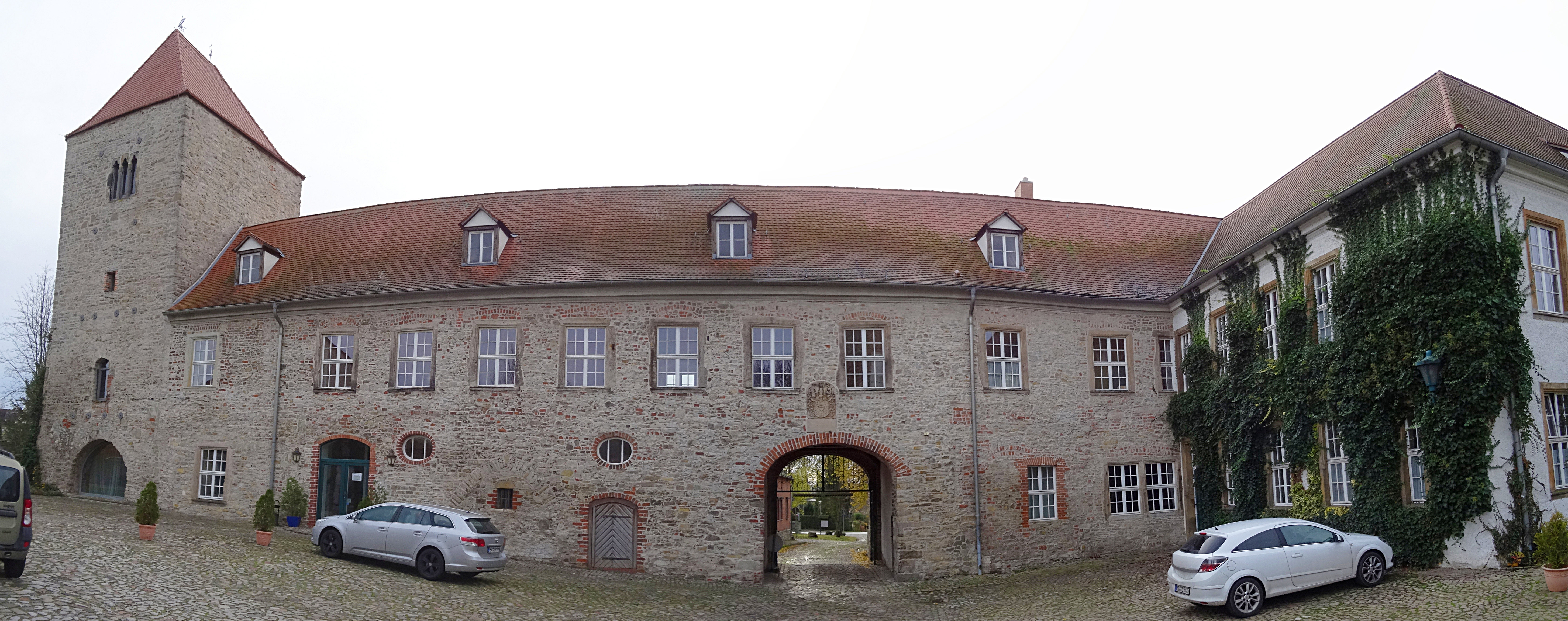 Burg Wanzleben vom Burghof gesehen